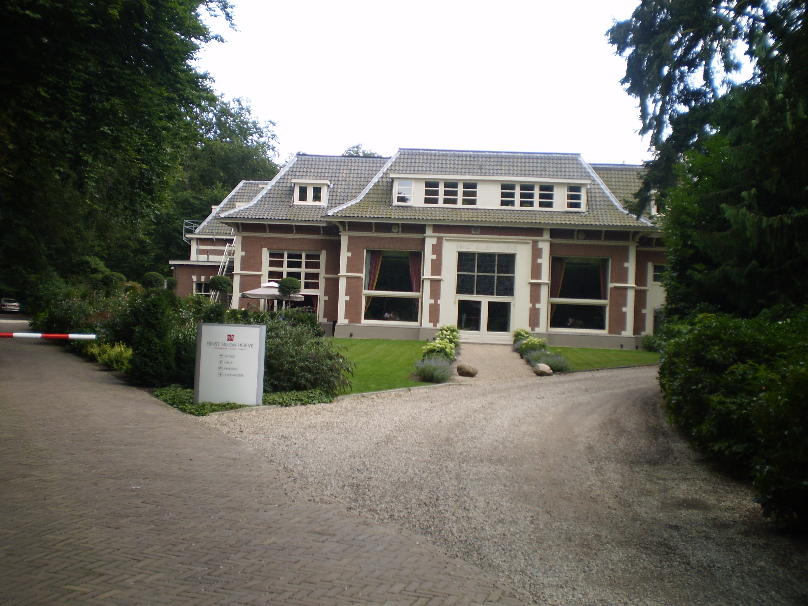 Ernst Sillem Hoeve.